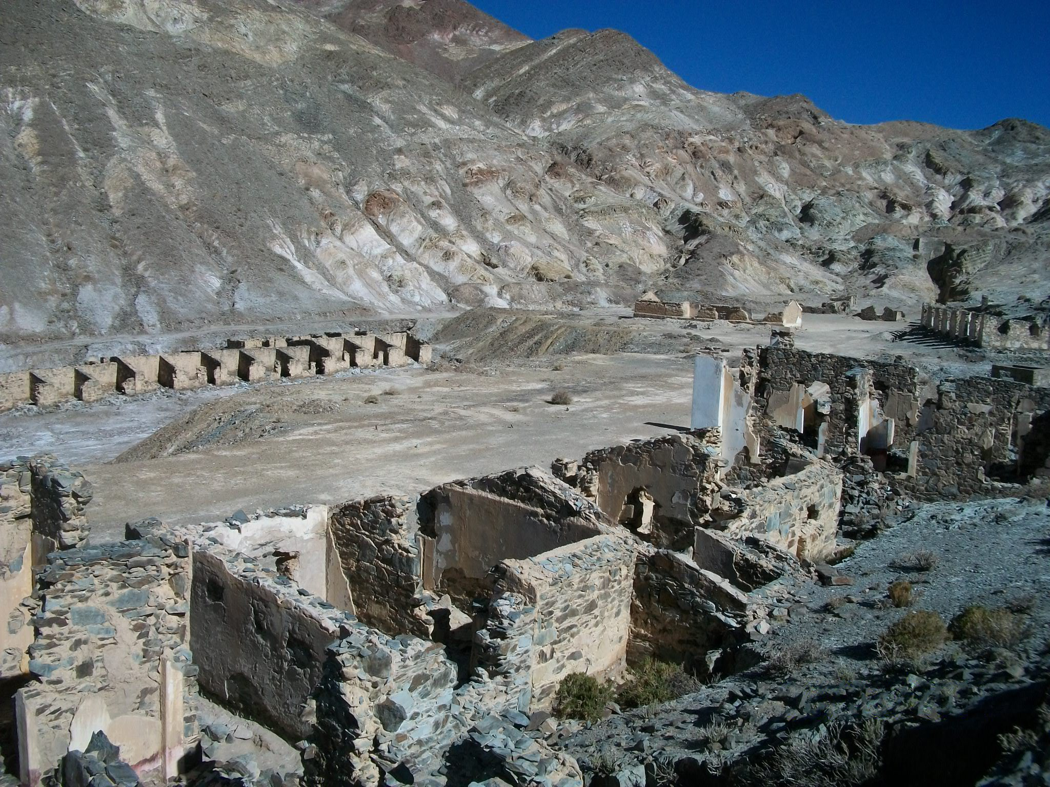 Ruinas de las minas de Incahuasi que se ubican en el extremo sudoeste del Salar del Hombre Muerto, en el noreste del departamento Antofagasta de la Sierra, provincia de Catamarca.